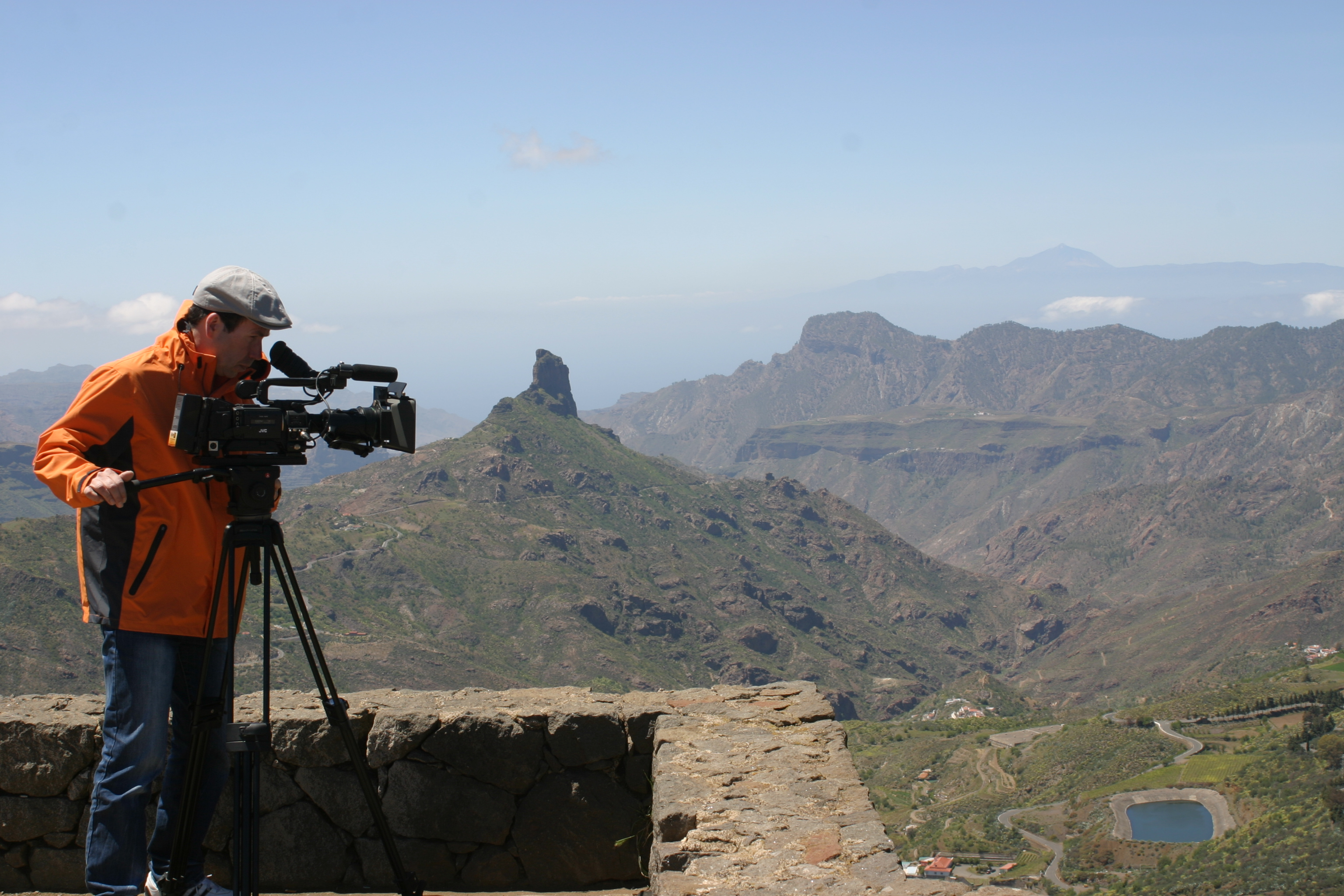 Reisekino - Filmteam bei den Dreharbeiten zum Reisekino - Filmporträt Gran Canaria. Im Bild Chief camera operator Frank Flecks